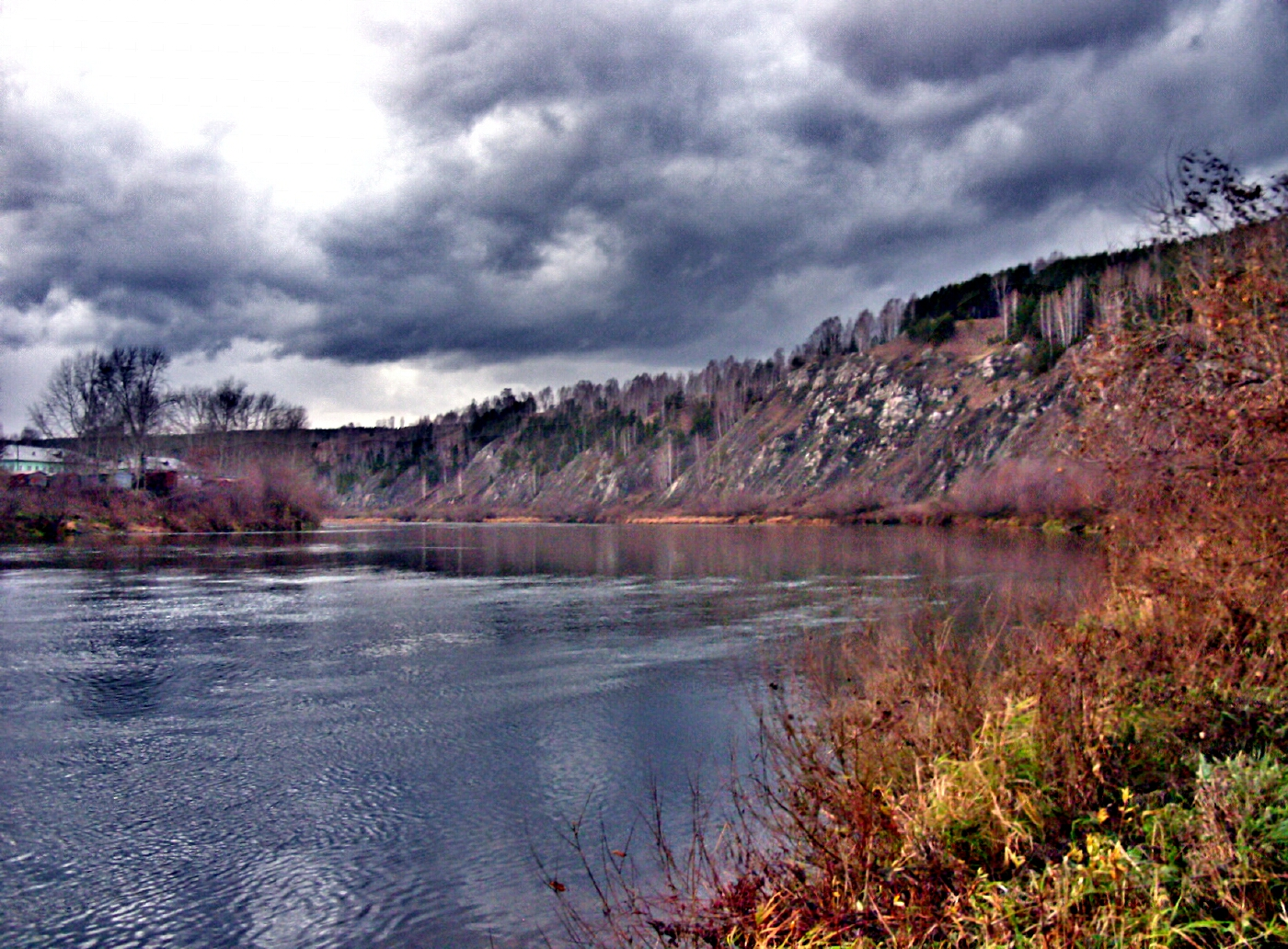 Сылва - река в Свердловской области и Пермском крае России. Длина 493 км, площадь бассейна 19 700 км². Берёт начало на западном склоне Среднего Урала, течёт в основном на запад.